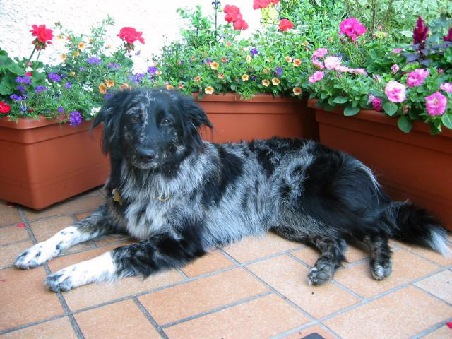 Altdeutscher Hütehund, Tiger